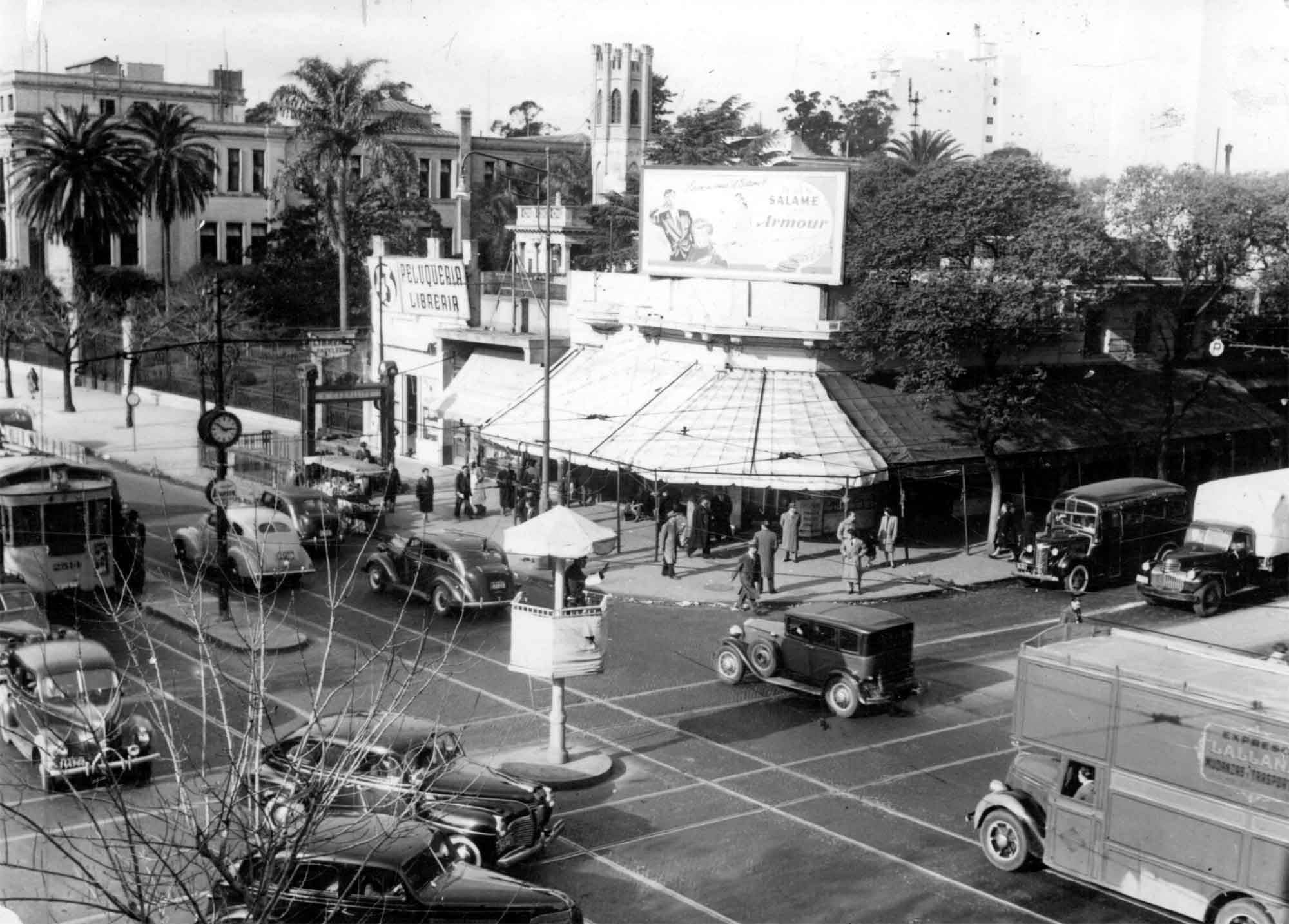 Esquina de la Avenida Rivadavia (izquierda) con Avenida José María Moreno (derecha). Se observan tranvías, colectivos y autos de la época con la garita de policía dirigiendo el tránsito. La boca de la estación Acoyte de la línea A de subterráneo. En la esquina, un café que ya no existe. Atrás asoma la torre gótica de la casa Bottaro, y al fondo el edificio de la Escuela Normal 4.